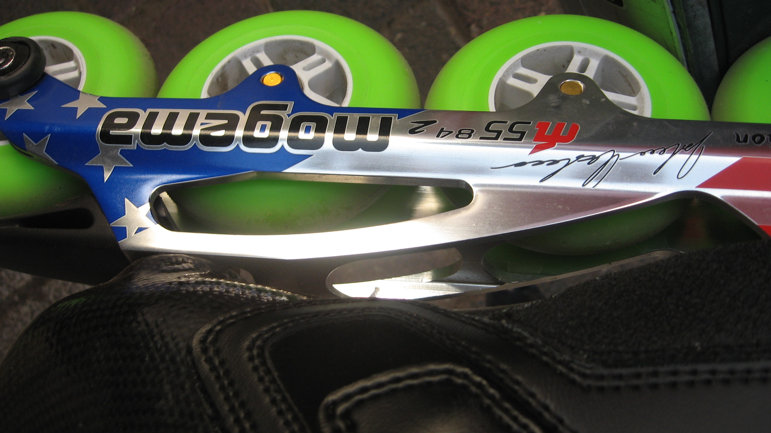 mogema